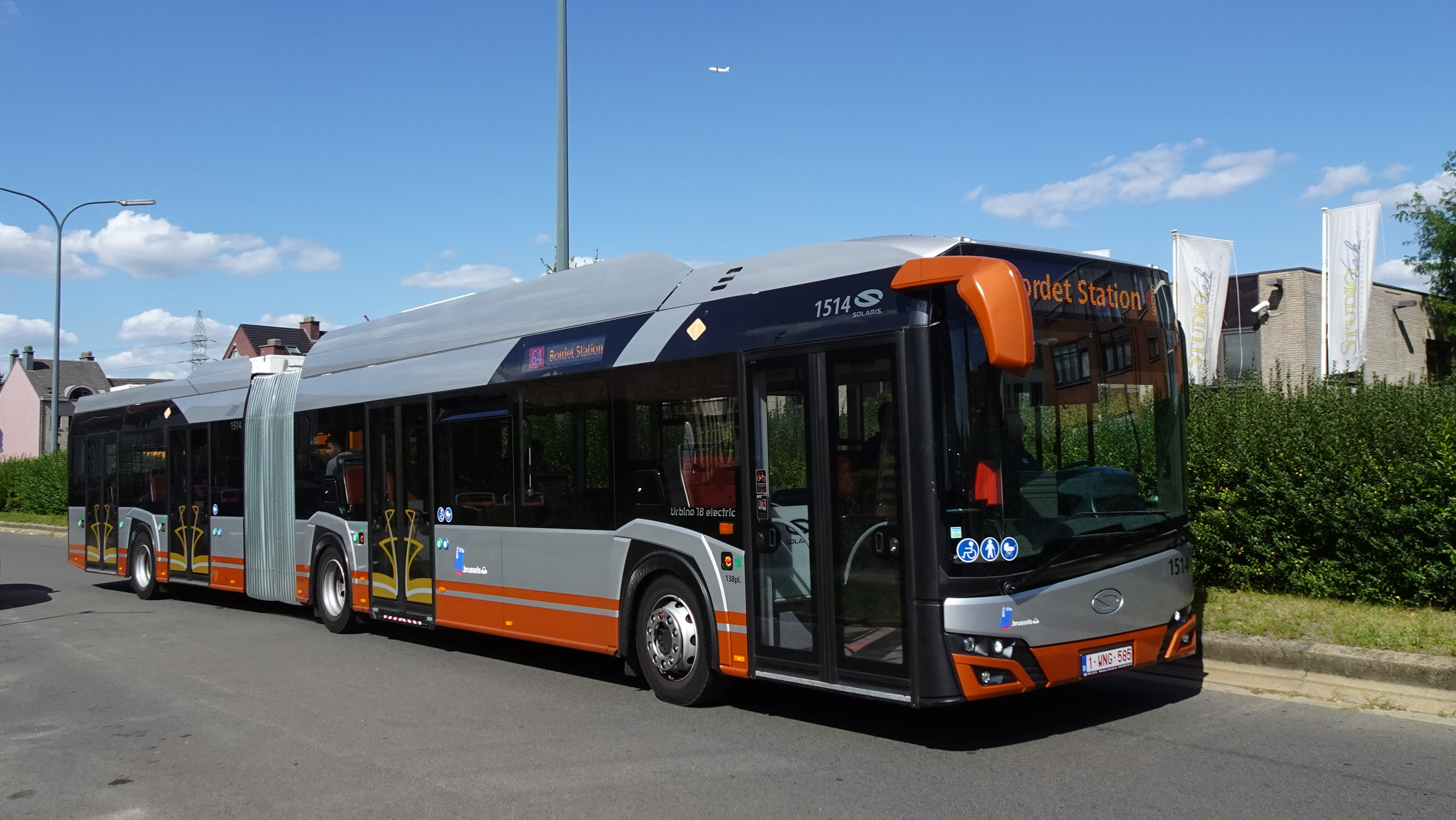 L'autobus électrique 1514 quitte l'arrêt Vandenhoven sur la ligne 64.